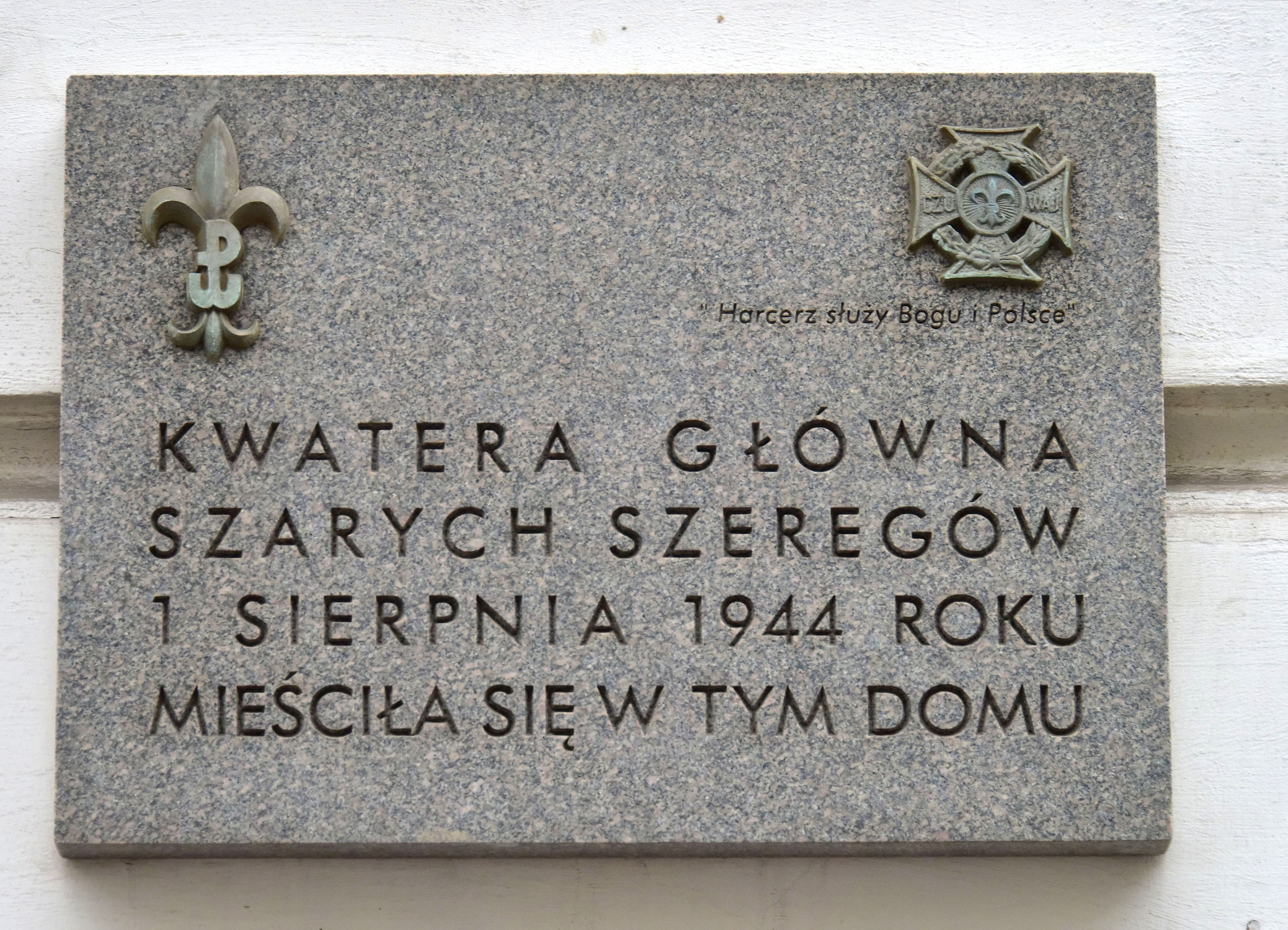 Tablica upamiętniająca Kwaterę Główną Szarych Szeregów przy ul. Wilczej 44 w Warszawie